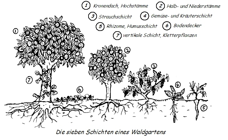 Das 7-Schichten-Prinzip eines Waldgartens